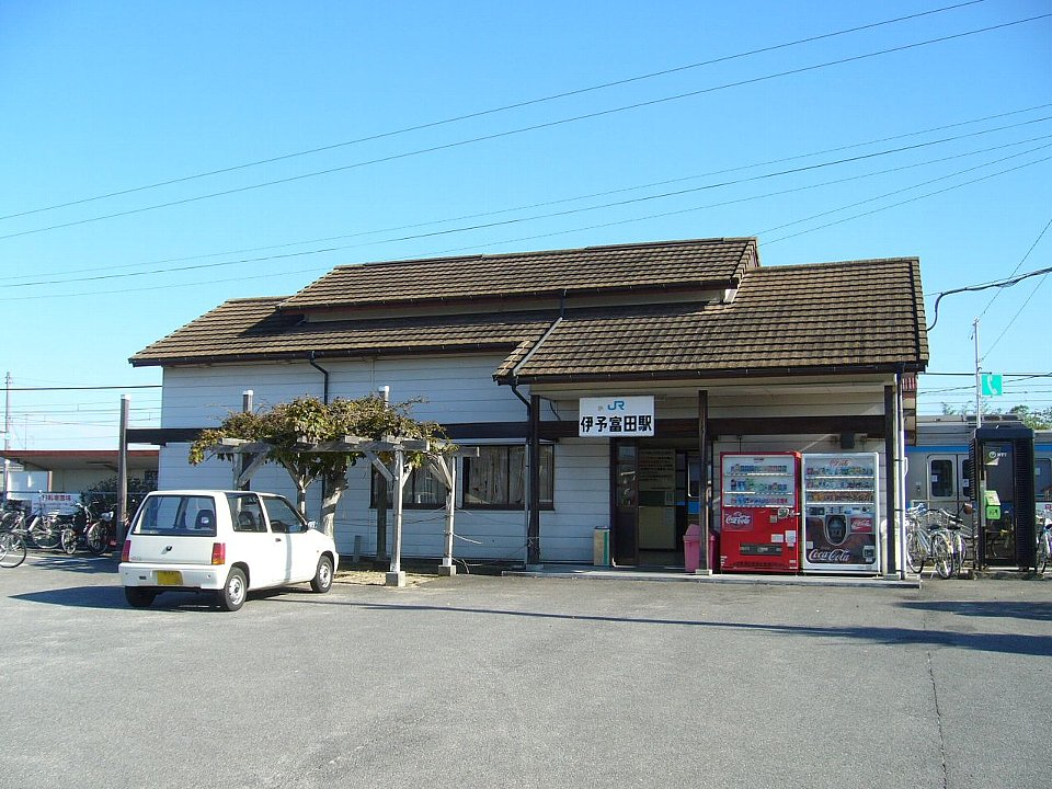 予讃線伊予富田駅 駅舎 2006年12月 Bakkai撮影